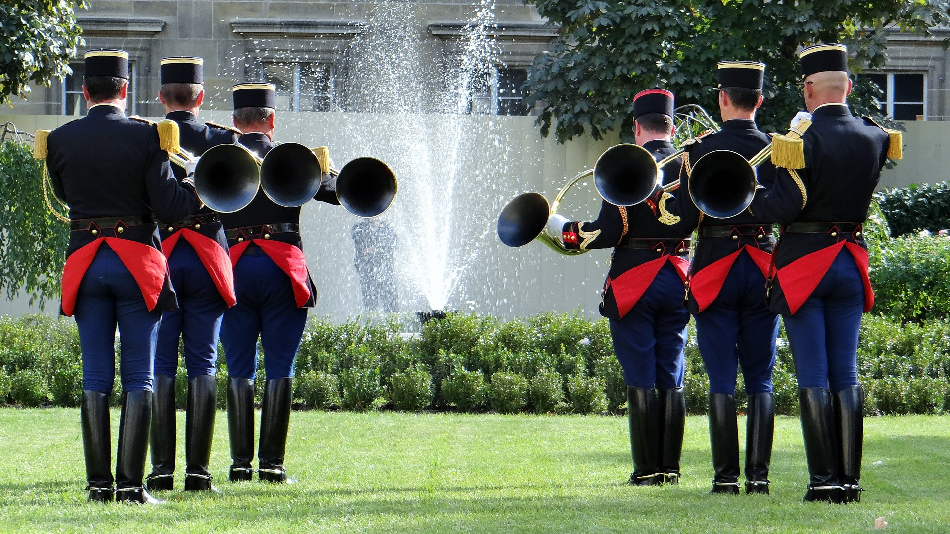 Trompes de chasse de la Républicaine en concert dans les jardins à l'occasion des Journées Européennes de Patrimoine 2017.